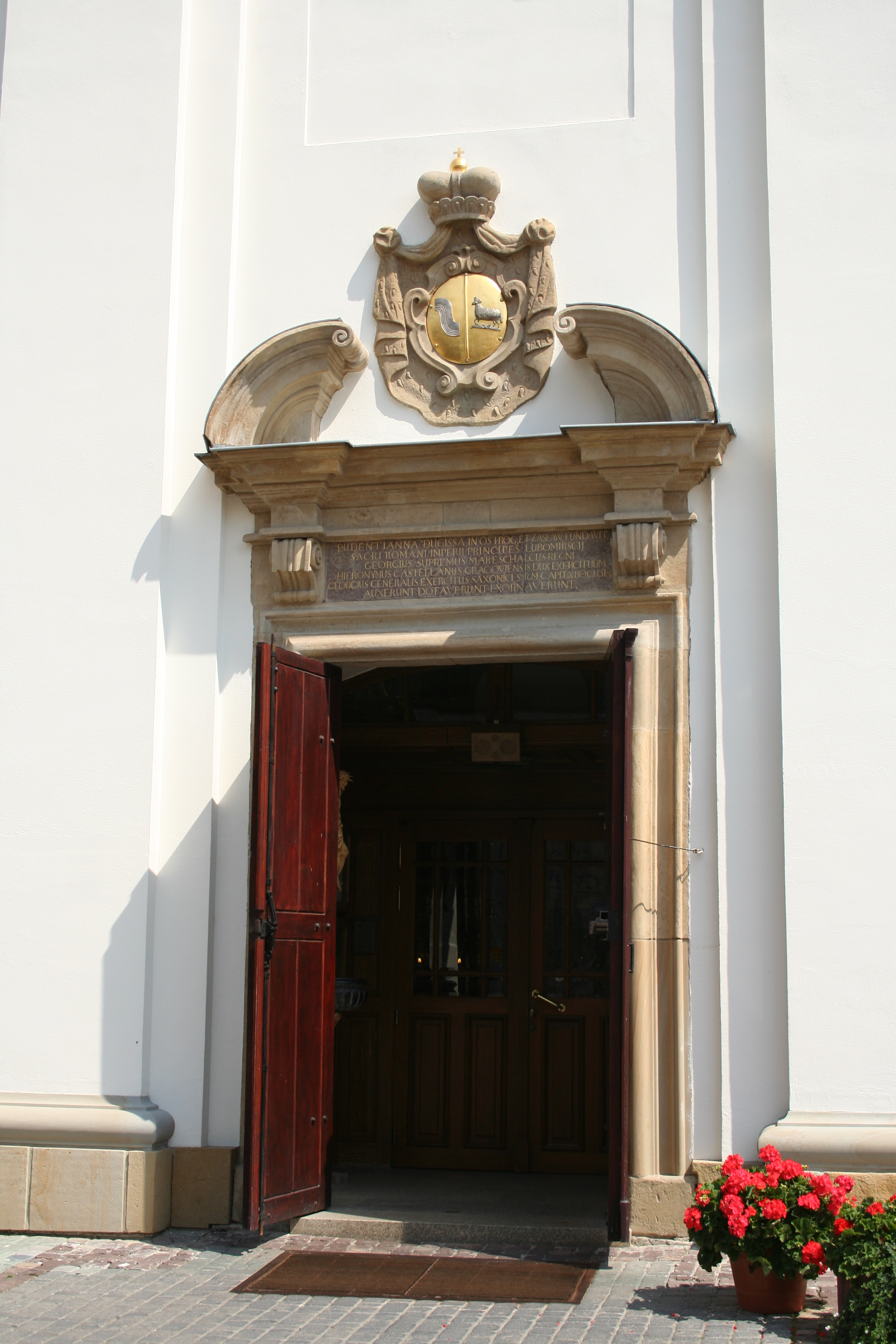 Kościół w Rzeszowie w Śródmieściu - detal